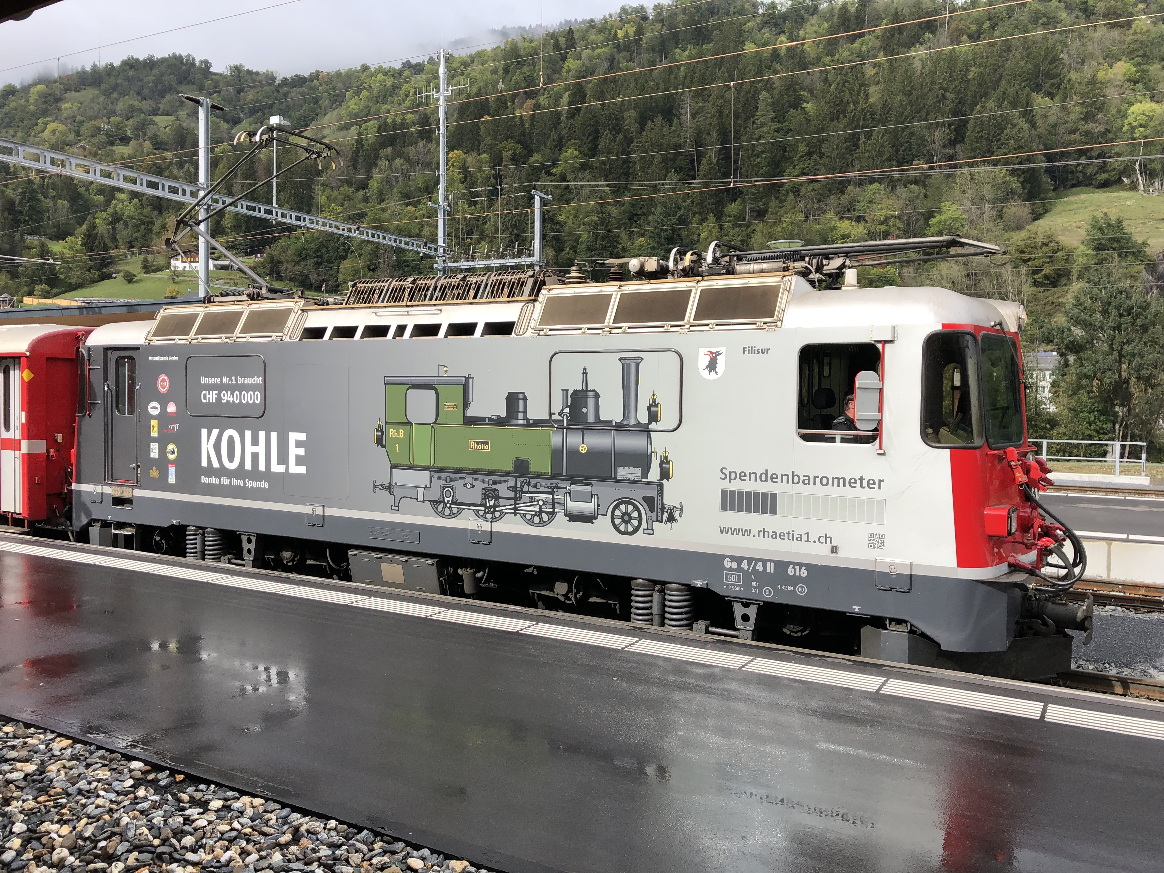 Spendenaufruf für Lok LD G 3/4